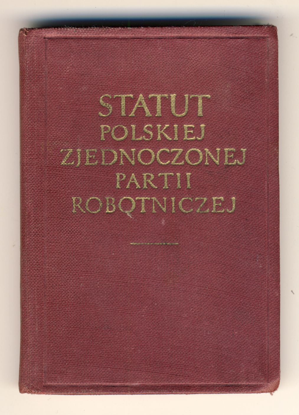 Wydanie kieszonkowe statutu PZPR z 1956 roku